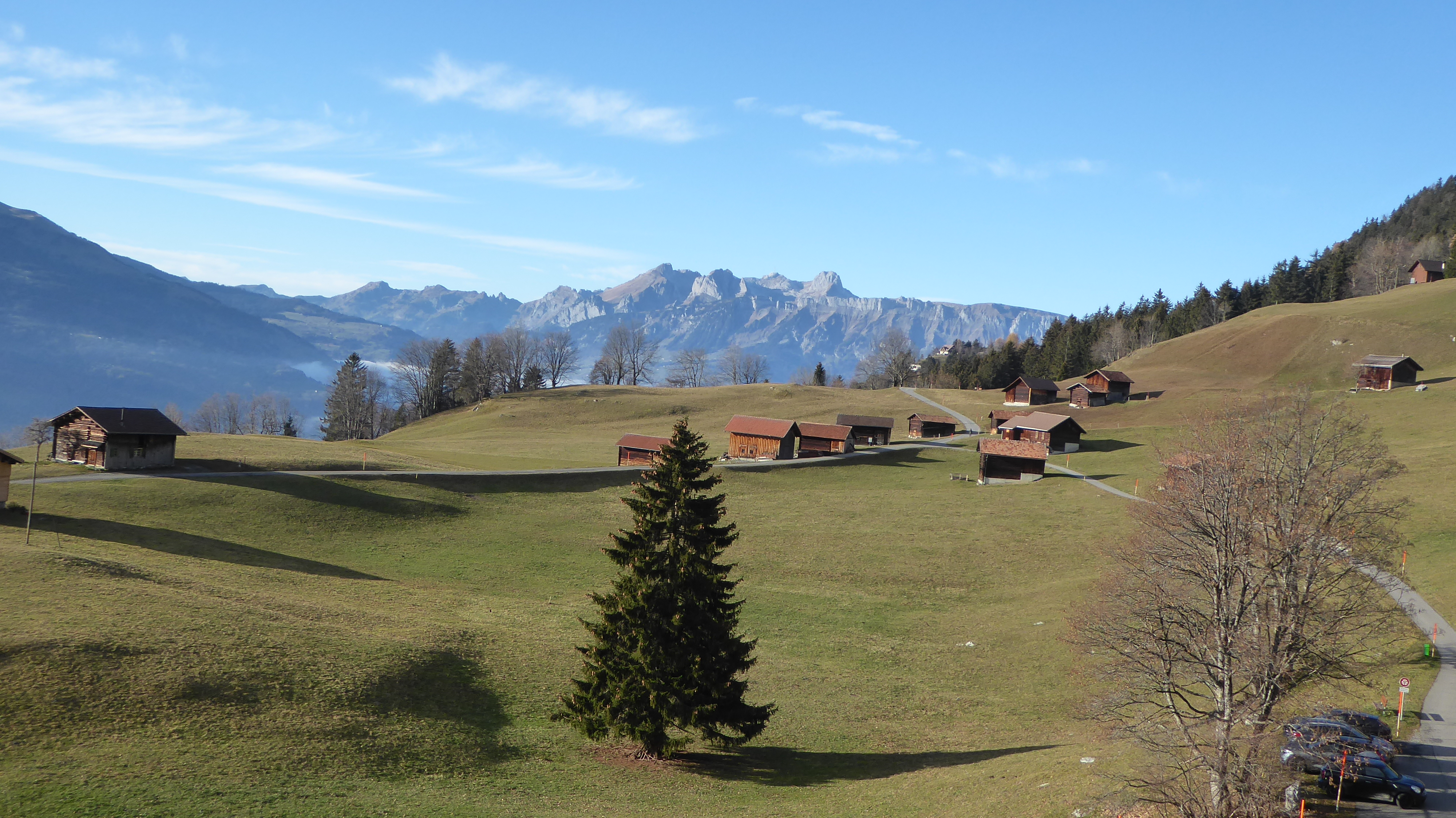 Siedlung Gnalp oberhalb Triesenberg, im Hintergrund Alpstein mit Säntis